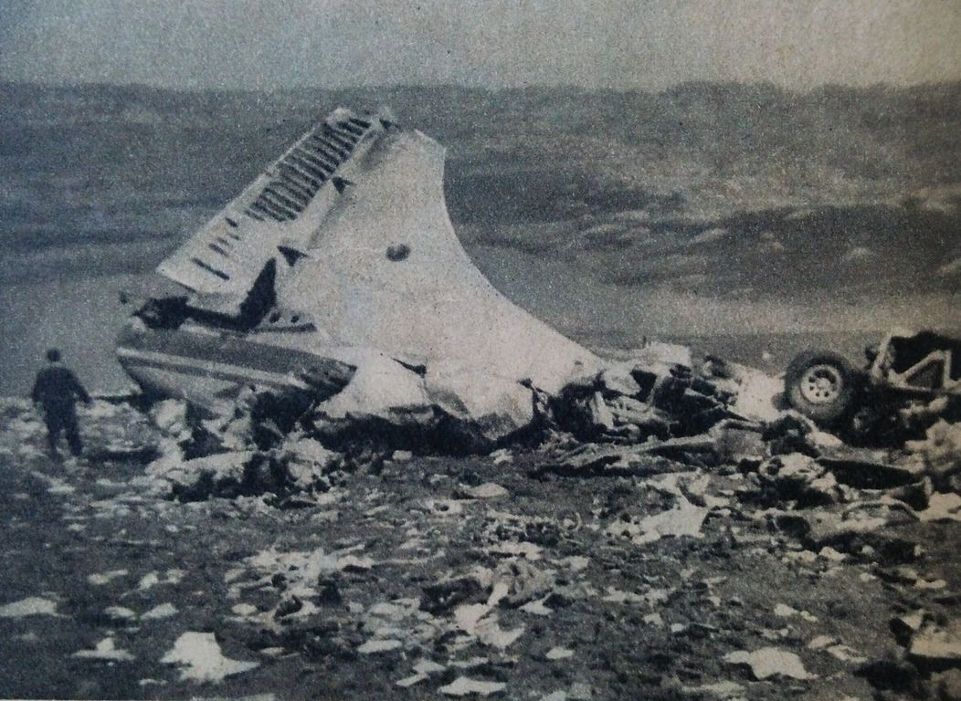 もく星号墜落事故の現場